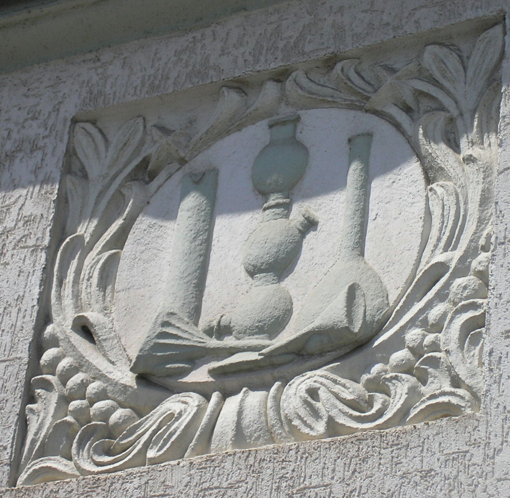 Dekoration an der Hauswand einer ehemaligen Glasbläserwerkstatt in Ilmenau (Thüringen).